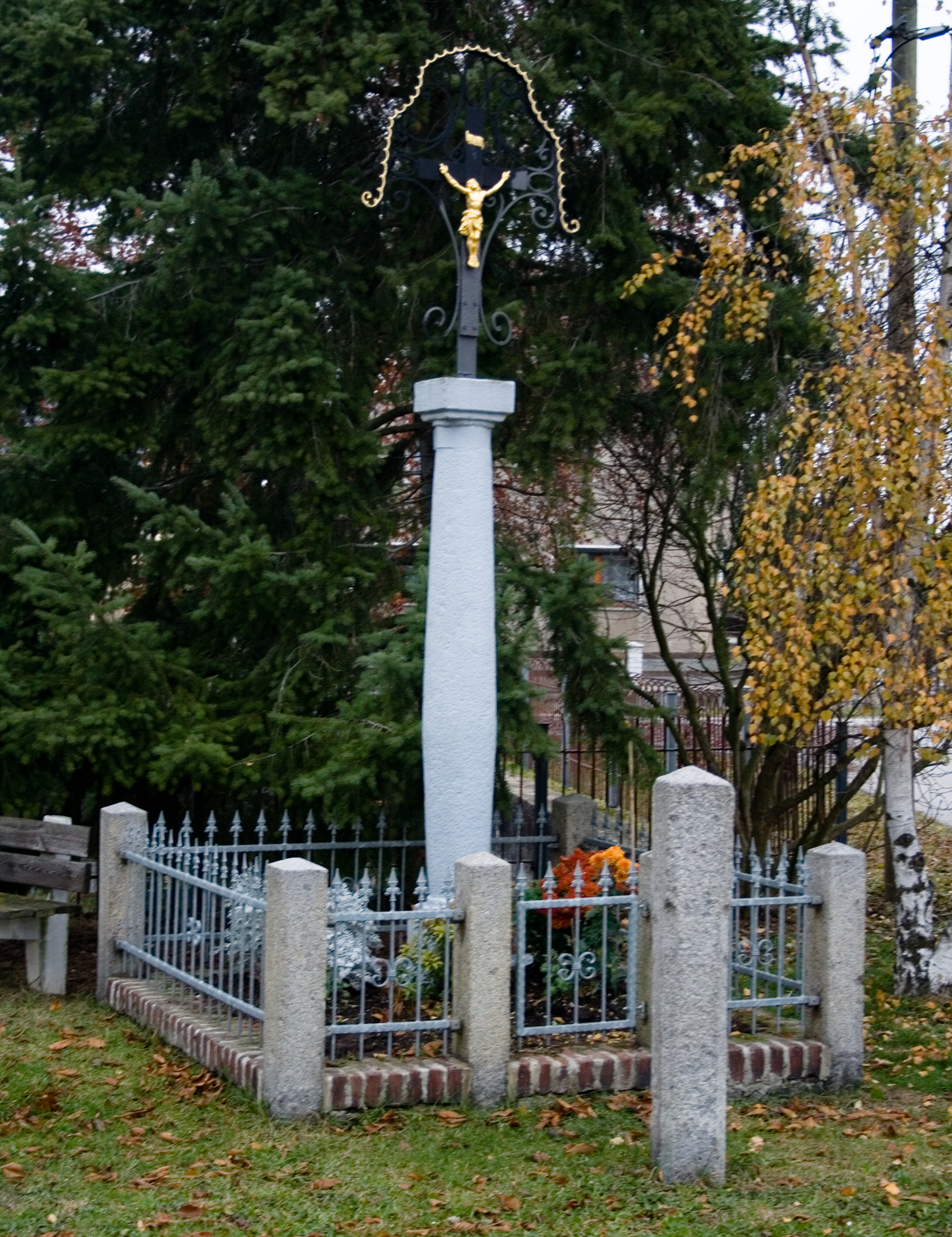 Brohna-Dorfplatz (11/2007) Hornjoserbsce: Bronjanska nawjes